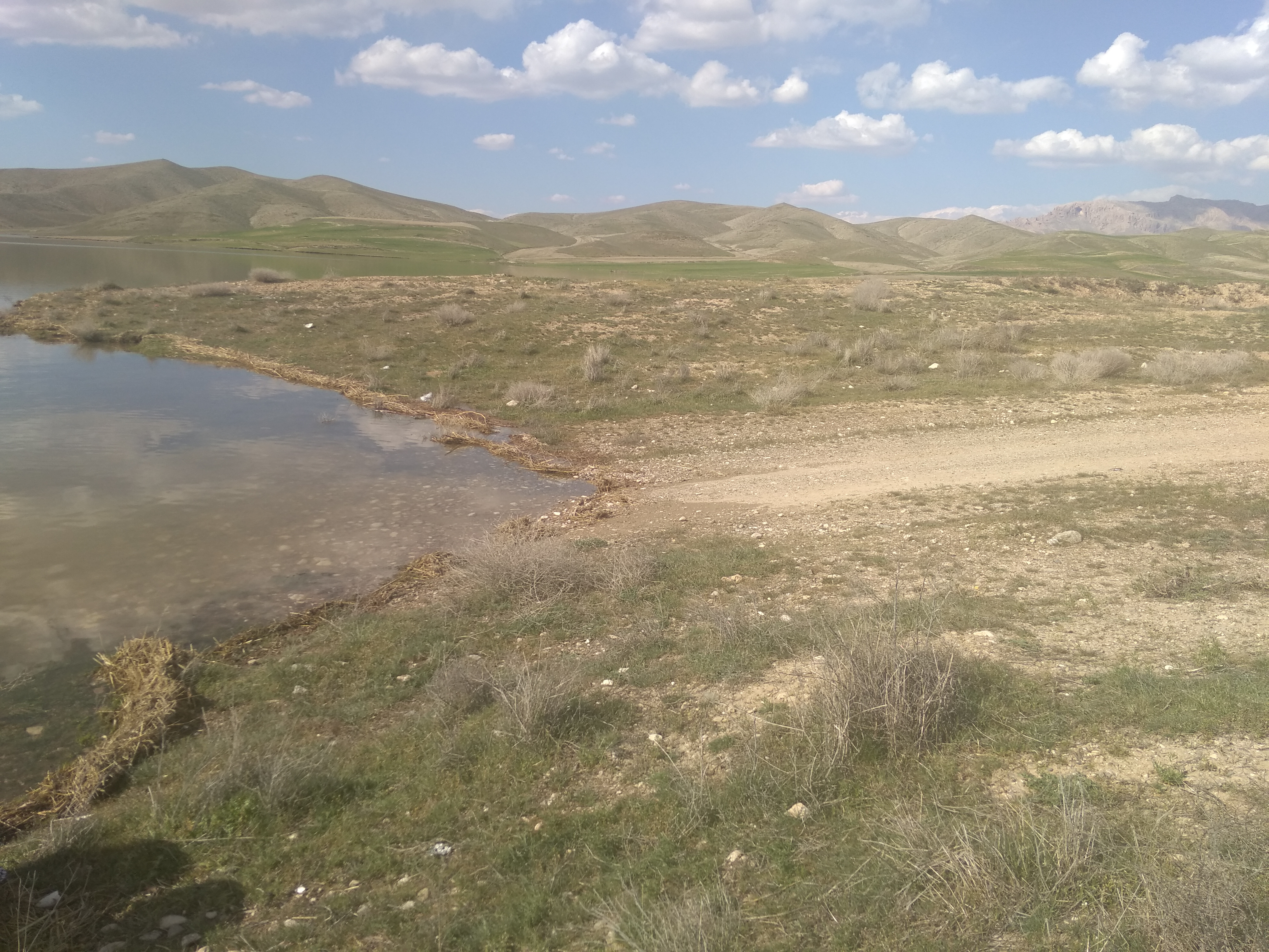 تصویر محو شدن روستای چهل امیران بیجار گروس در زیر آب سد تالوار در 5 اردیبهشت 1398